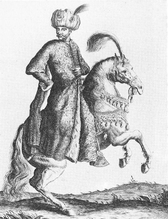 Kupferstich von Mehmed IV.